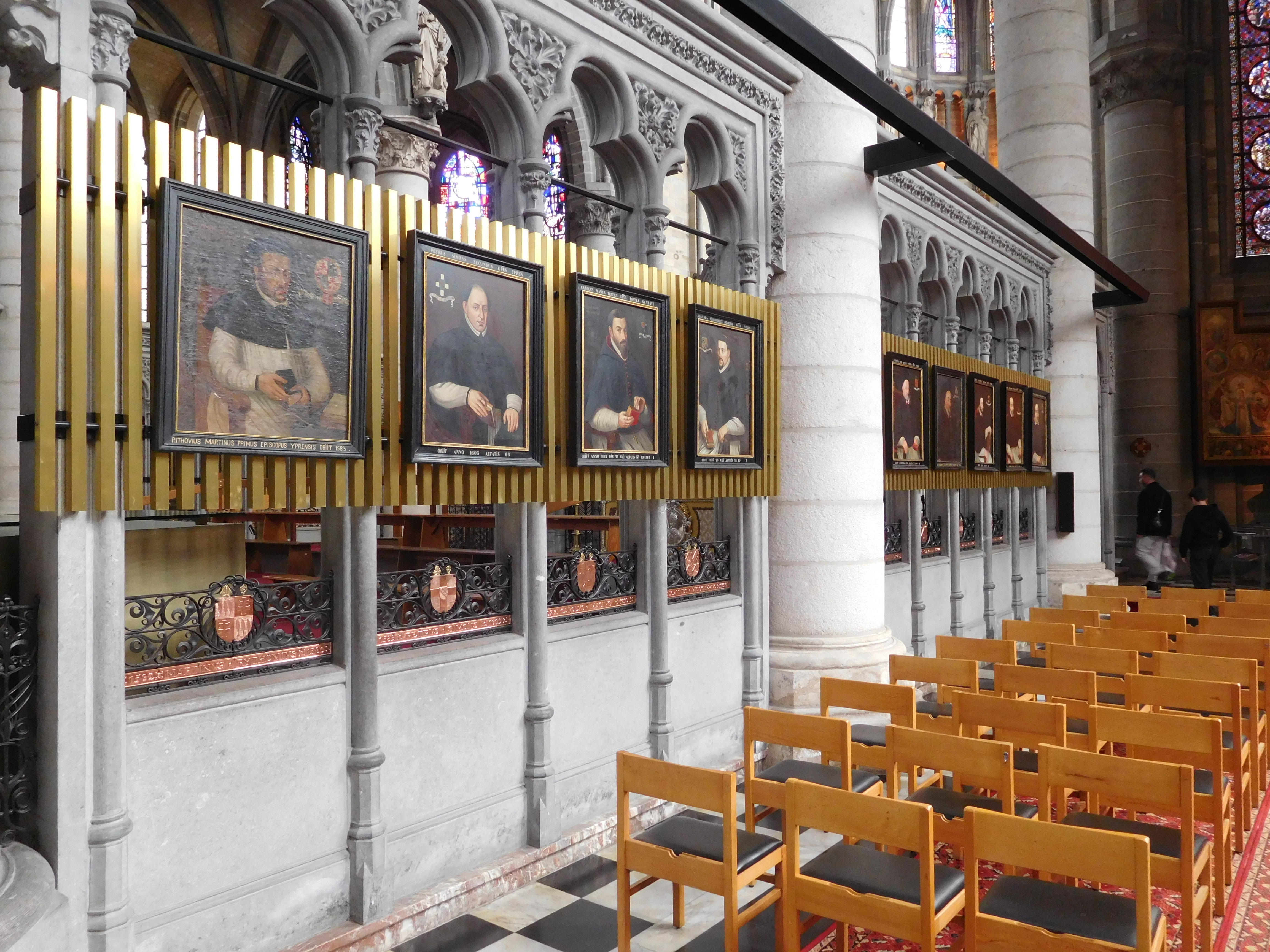 Dans l'ancienne cathédrale Saint-Martin d'Ypres se trouve les portraits des évêques d'Ypres (dans le déambulatoire)